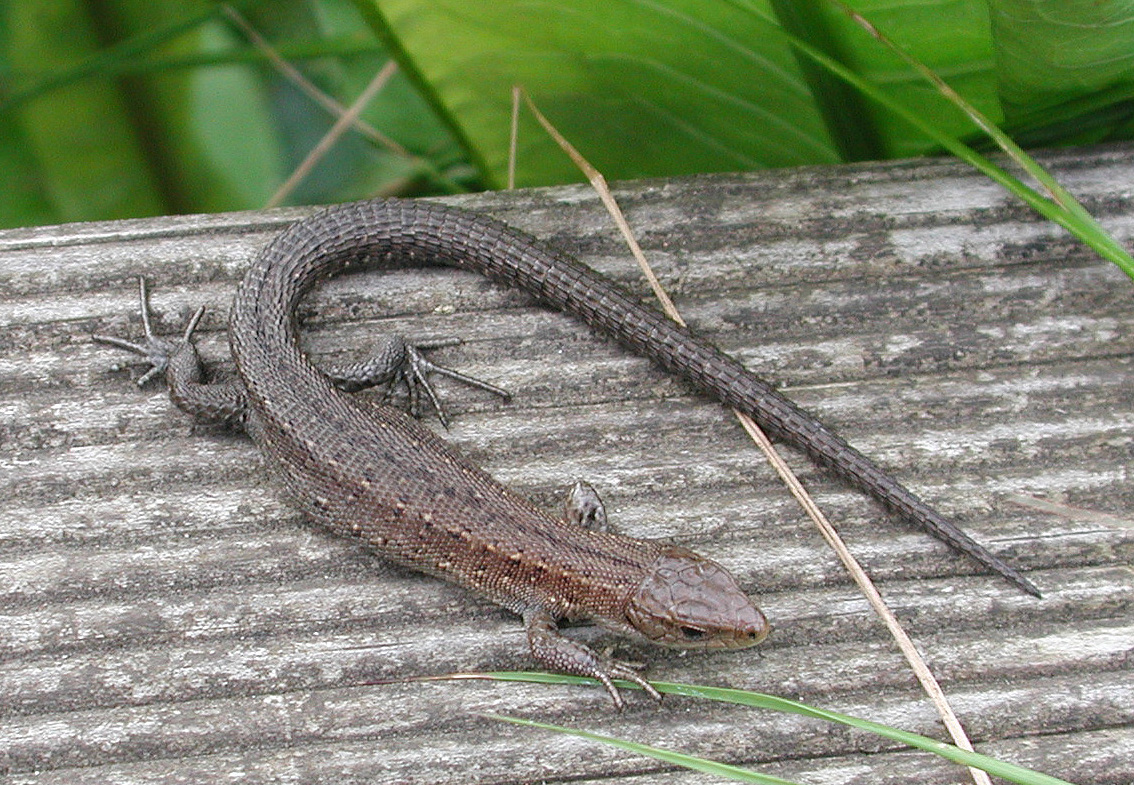 Zootoca vivipara, Waldeidechse, Elbmarsch bei Hamburg, Germany